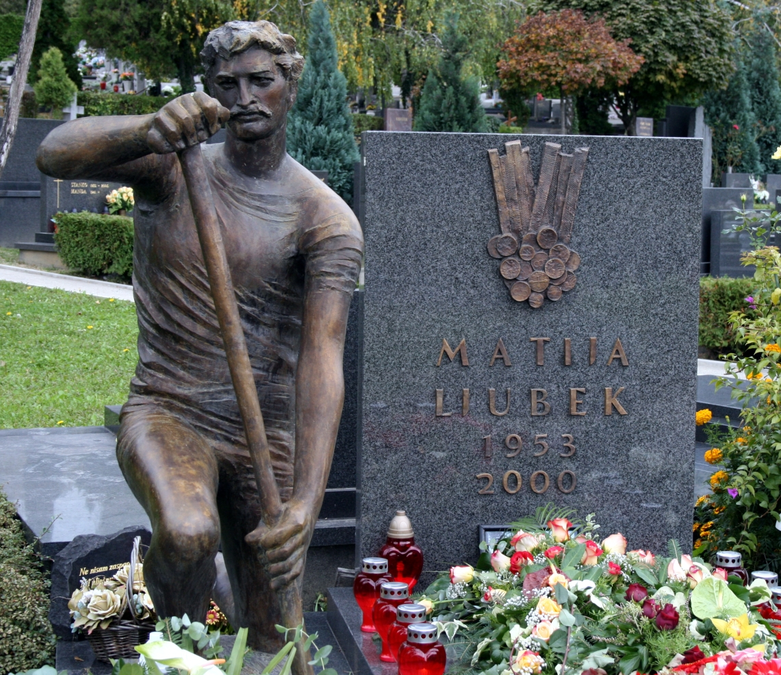 grob Matije Ljubeka na Mirogoju u Zagrebu, Hrvatska